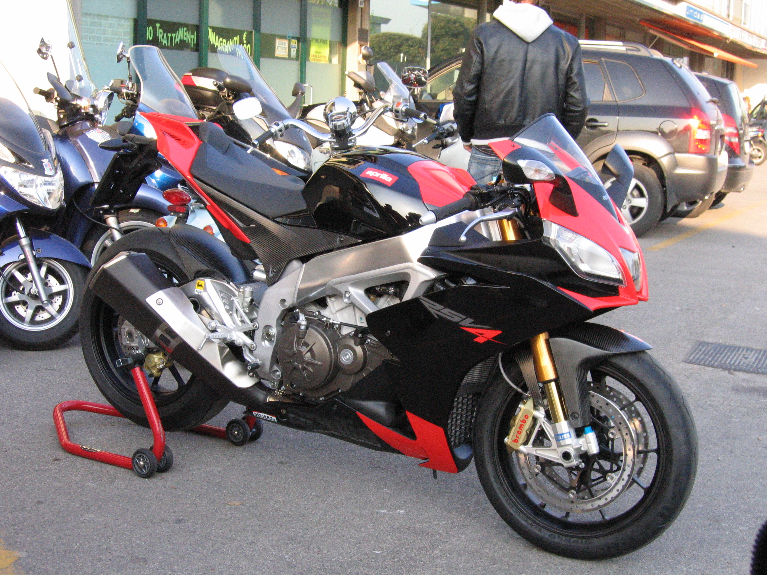 Fabbri Flavio Buscherini moto FC sono l'autore della foto